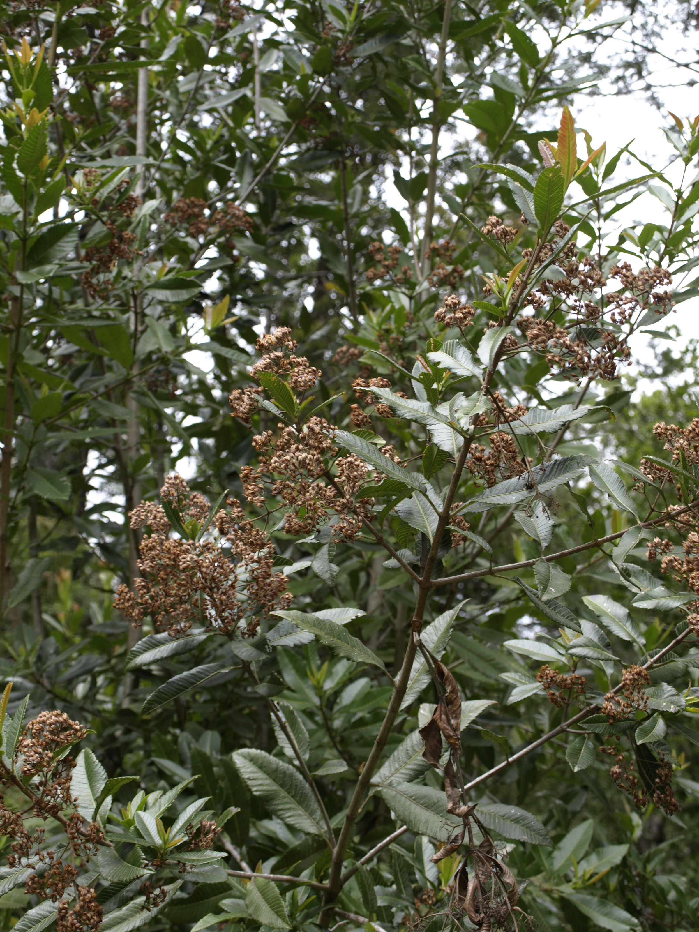 Caldcluvia paniculata, Parque Nacional Oncol, Chile